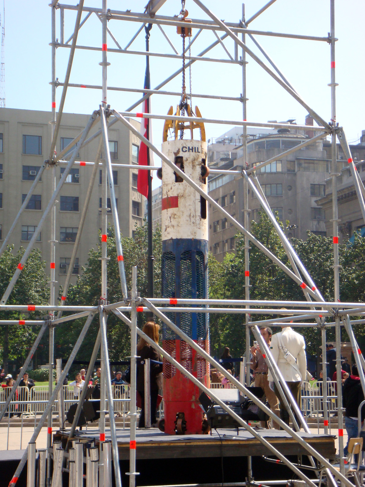 Cápsula Fénix-2 utilizada en el rescate de los mineros de la mina San José, en exhibición en Santiago de Chile.